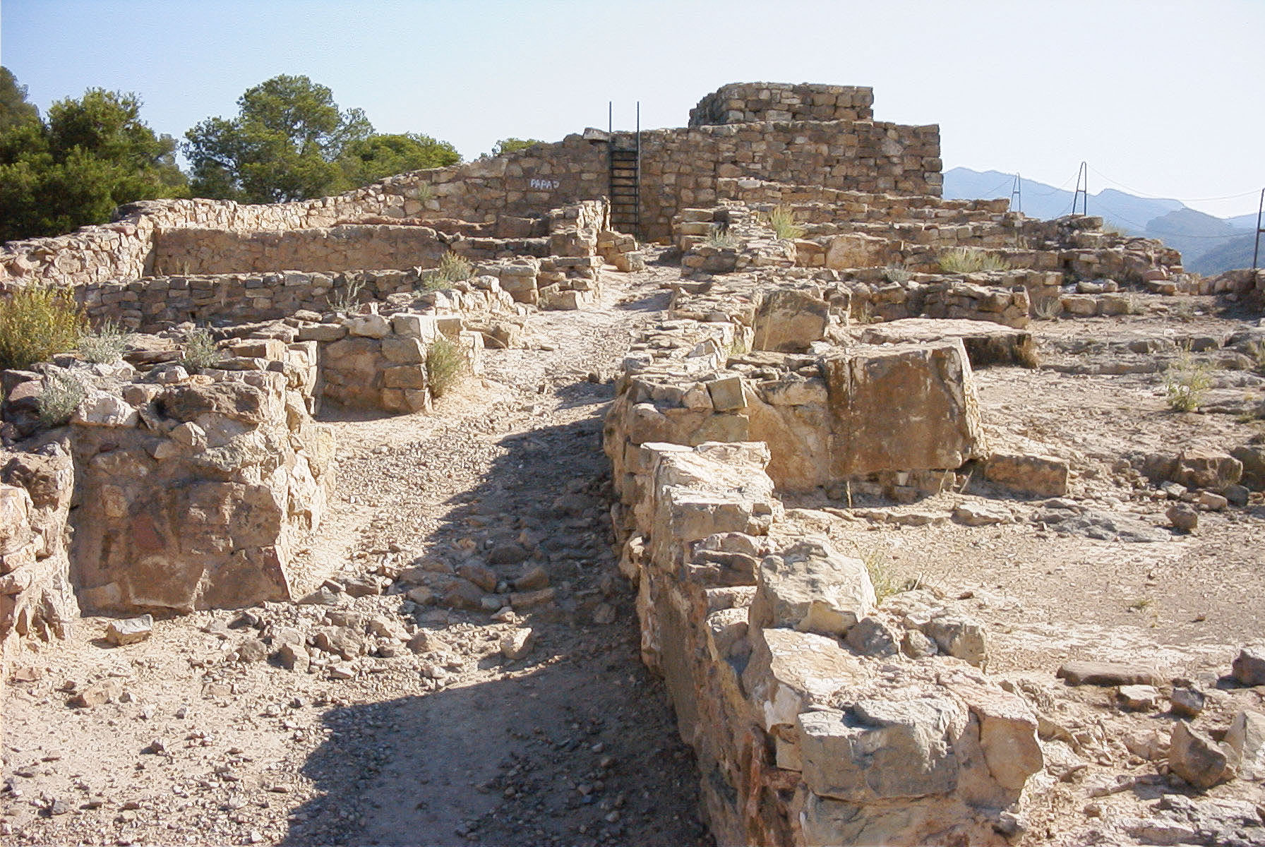 Vista del Puntal